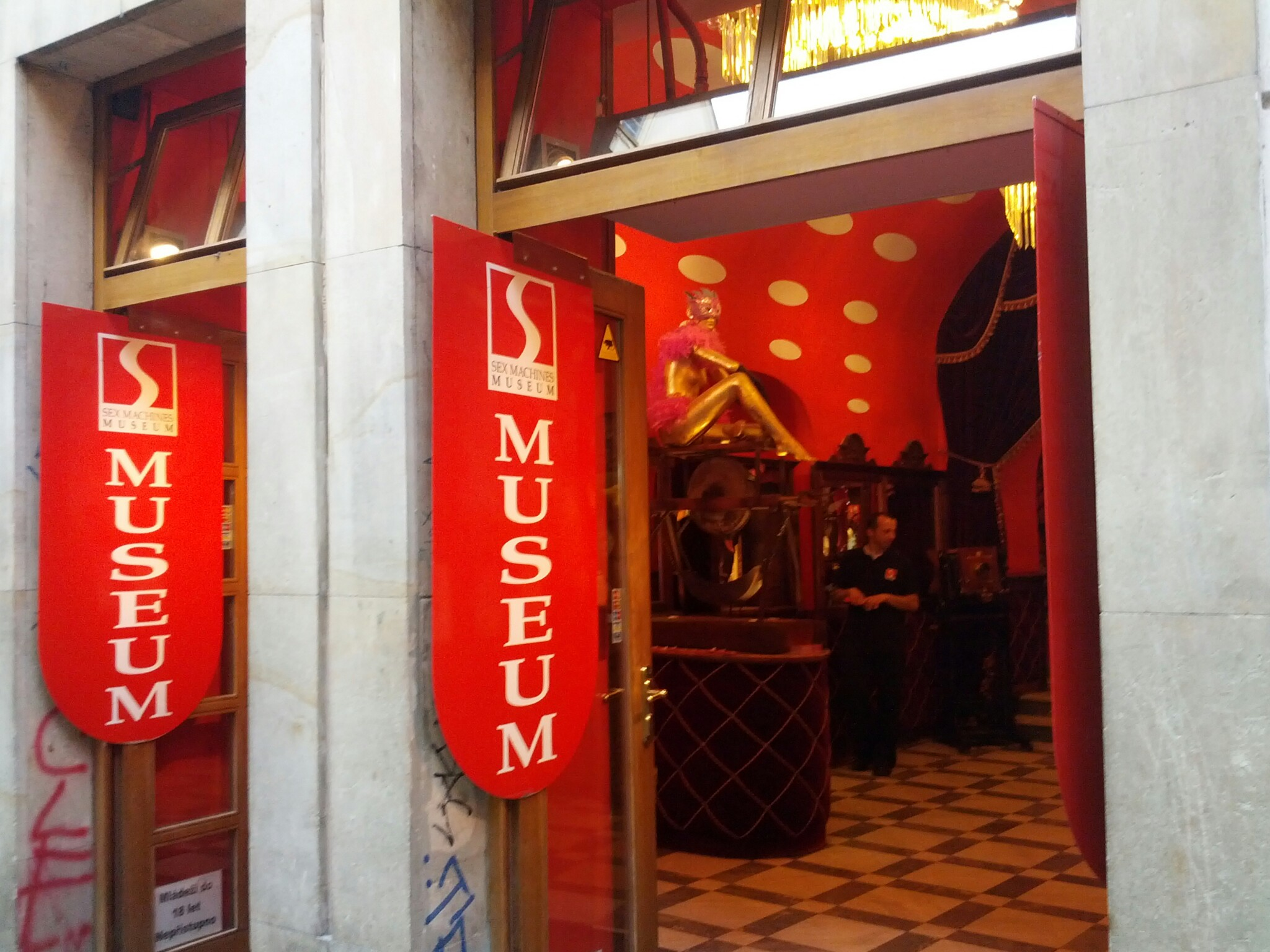 Praga